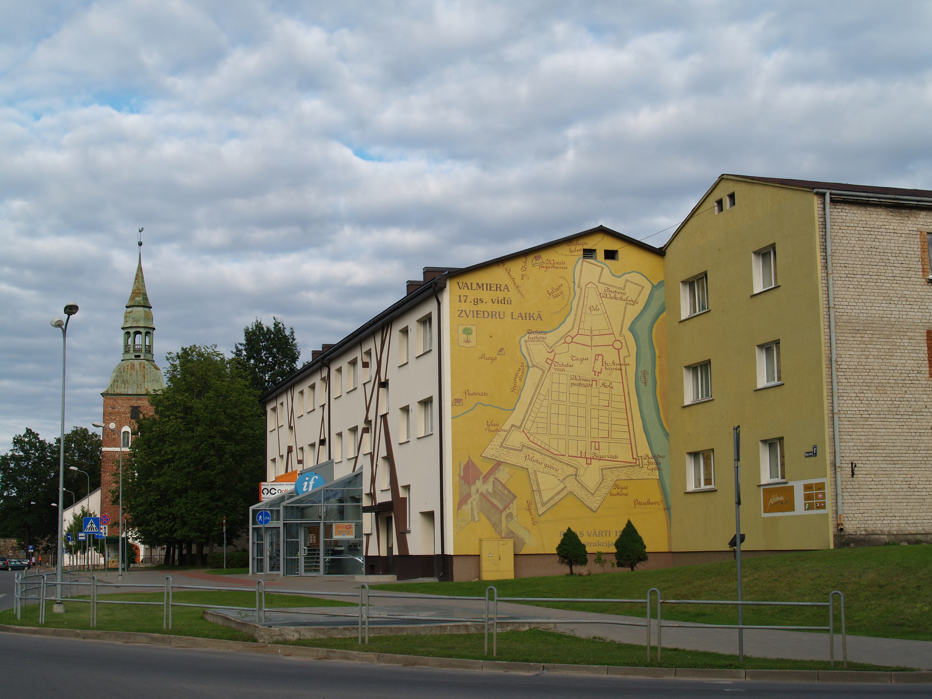 Valmiera kesklinn